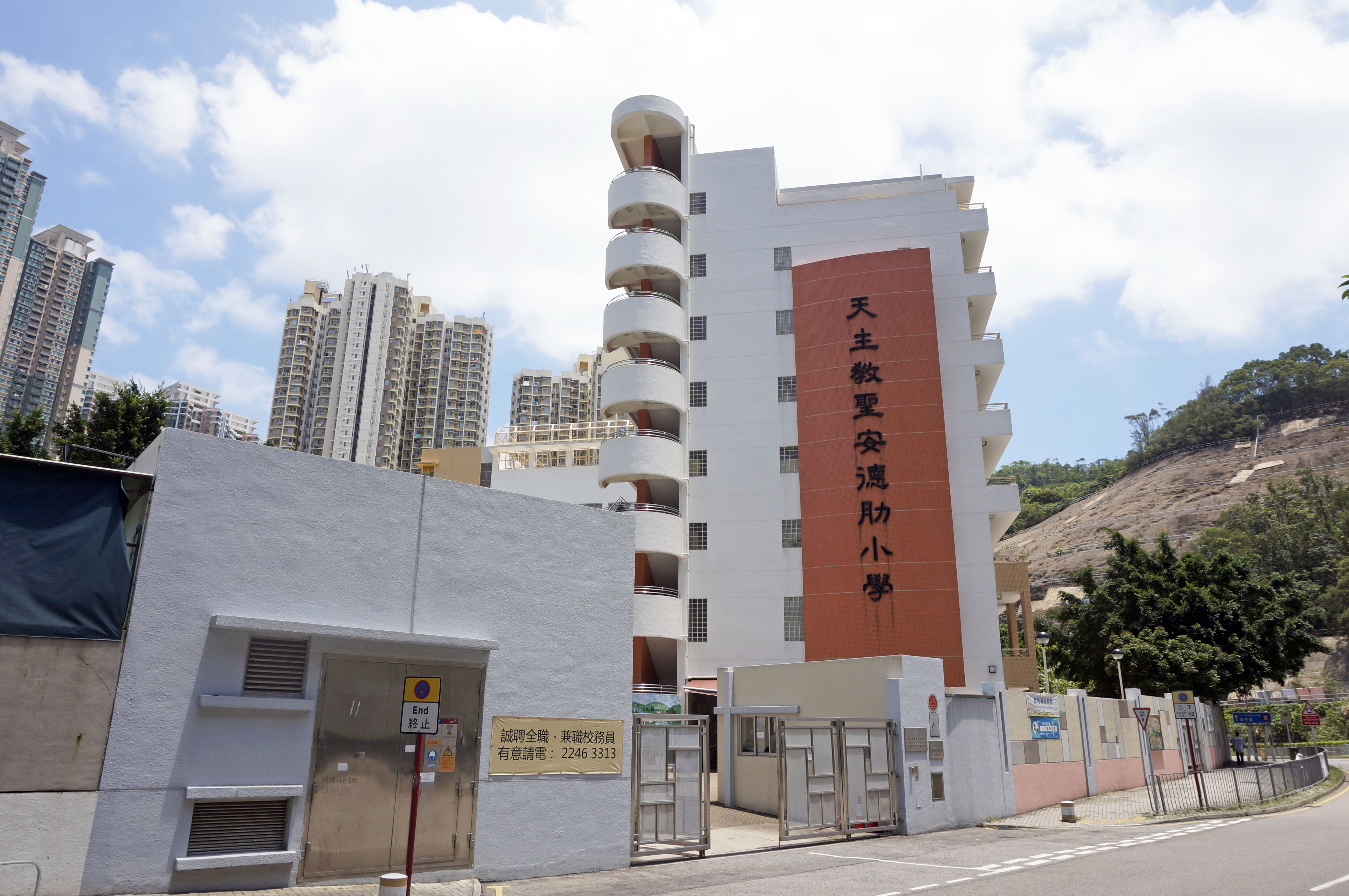 天主教聖安德肋小學調景嶺校舍側面外貌